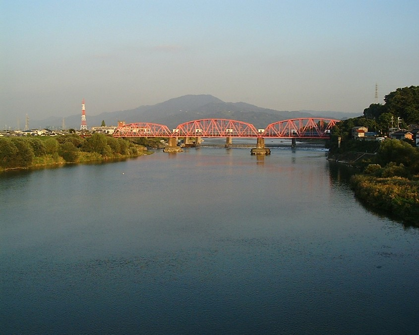 岩出橋からのja:紀ノ川 鉄橋はJR和歌山線（岩出～船戸）